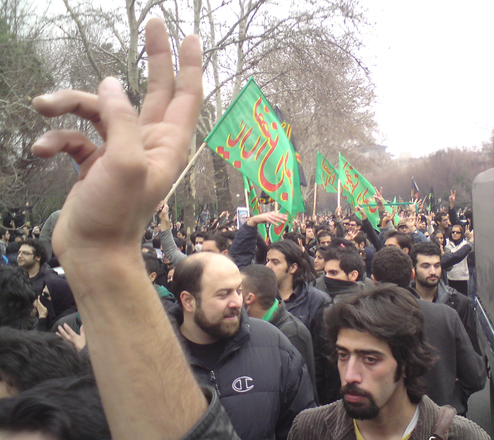 راهپیمایی جنبش سبز در روزعاشورا در بلوار کشاورز